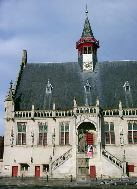 Jacob van Maerlant - eigen foto